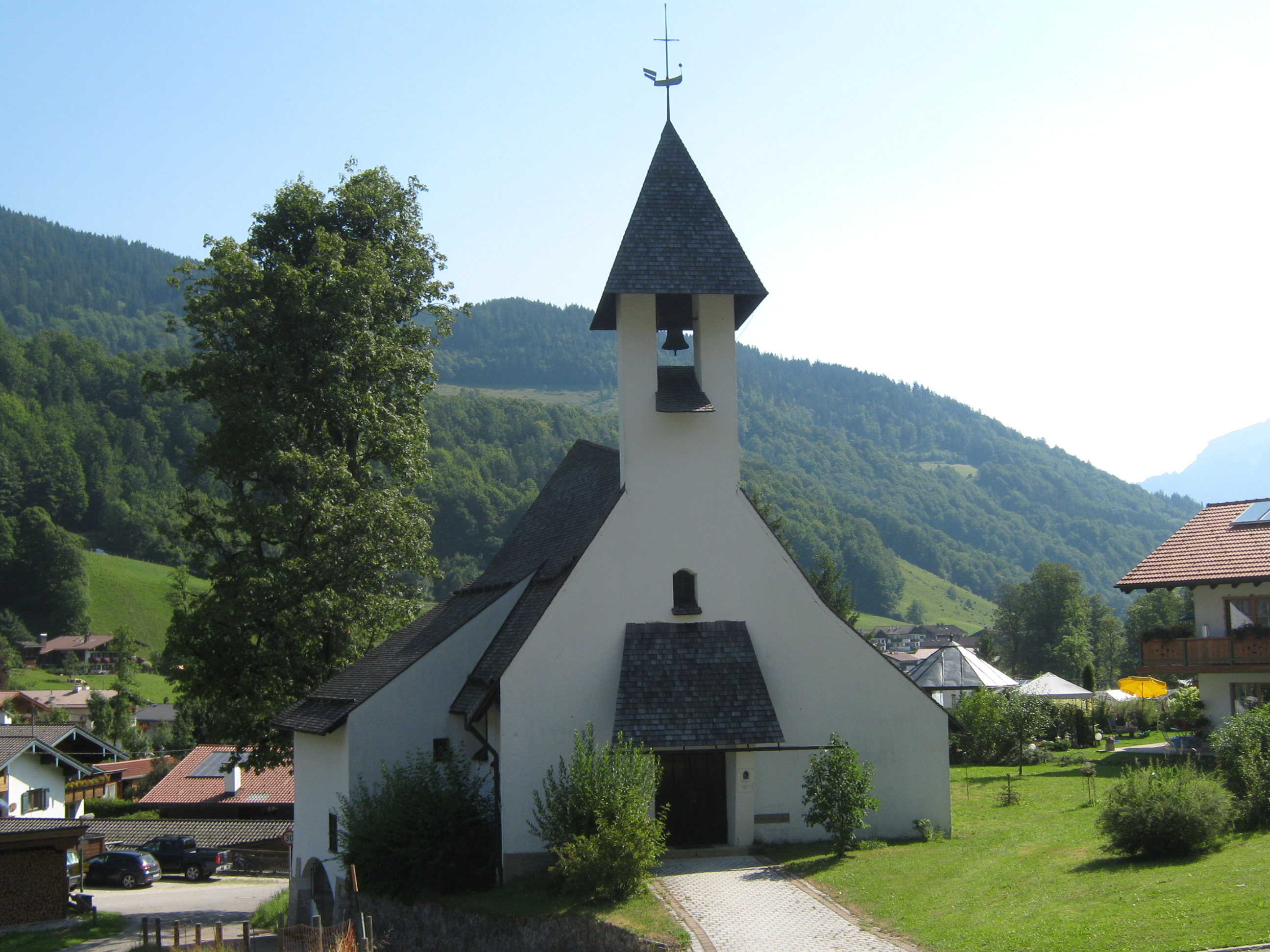 Evangelische Kirche Zum Guten Hirten in Ramsau bei Berchtesgaden, Eingangsseite Südwesten